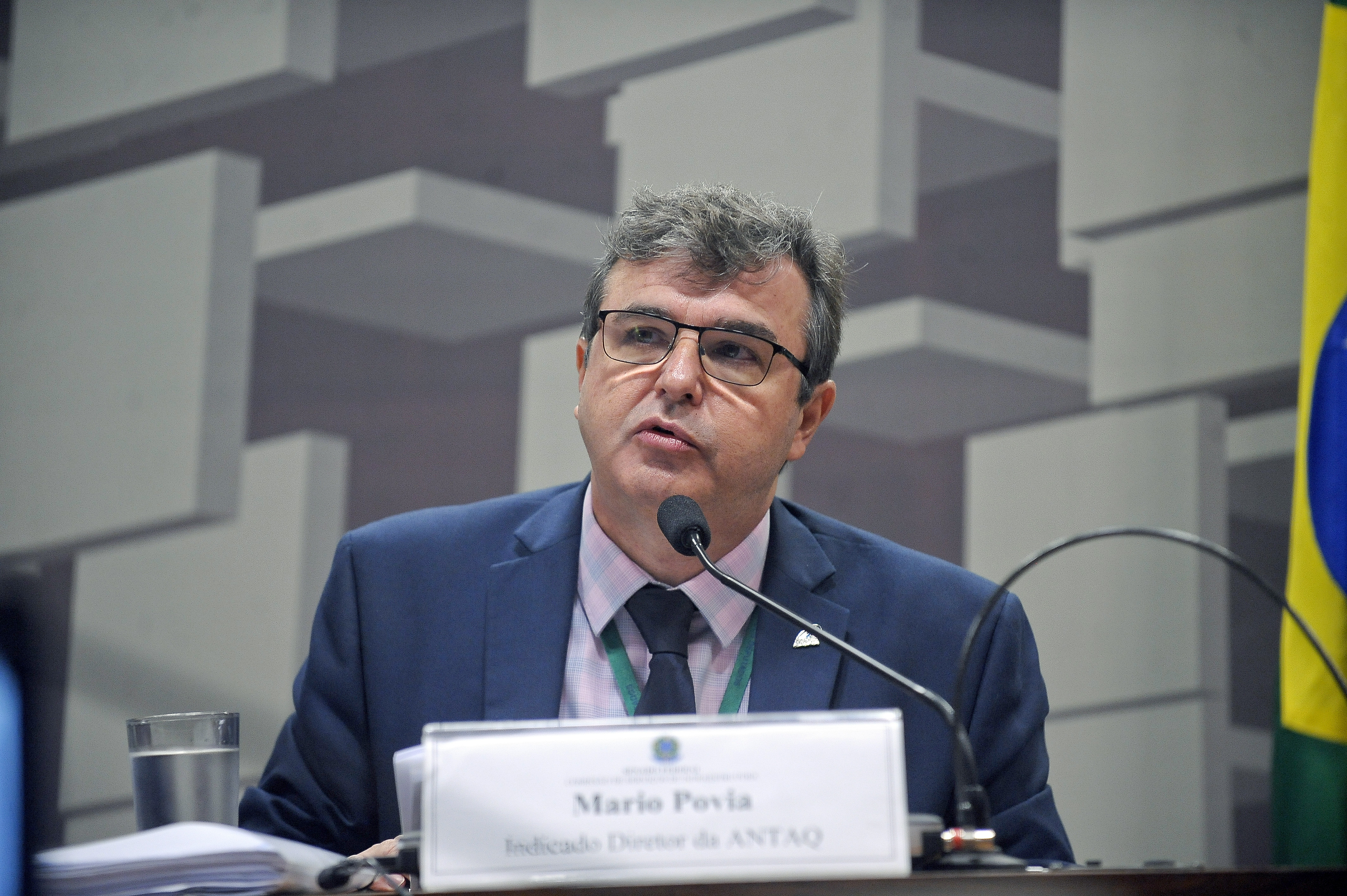 Comissão de Serviços de Infraestrutura (CI) realiza sabatina de Mário Povia, indicado para ser reconduzido ao cargo de diretor da Agência Nacional de Transportes Aquaviários (Antaq). Em pronunciamento, indicado para ser reconduzido ao cargo de diretor da Agência Nacional de Transportes Aquaviários (Antaq), Mário Povia. Foto: Pedro França/Agência Senado